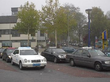 Taxi's voor station Zwolle